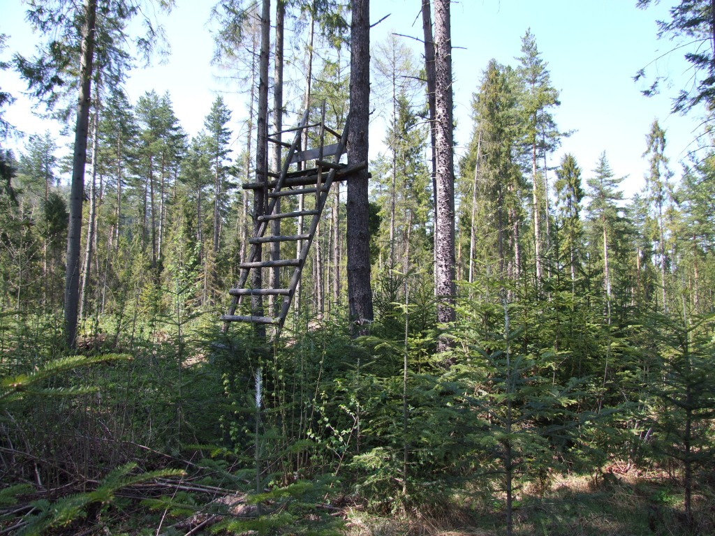 Przełęcz Przesła w Pieninach Spiskich